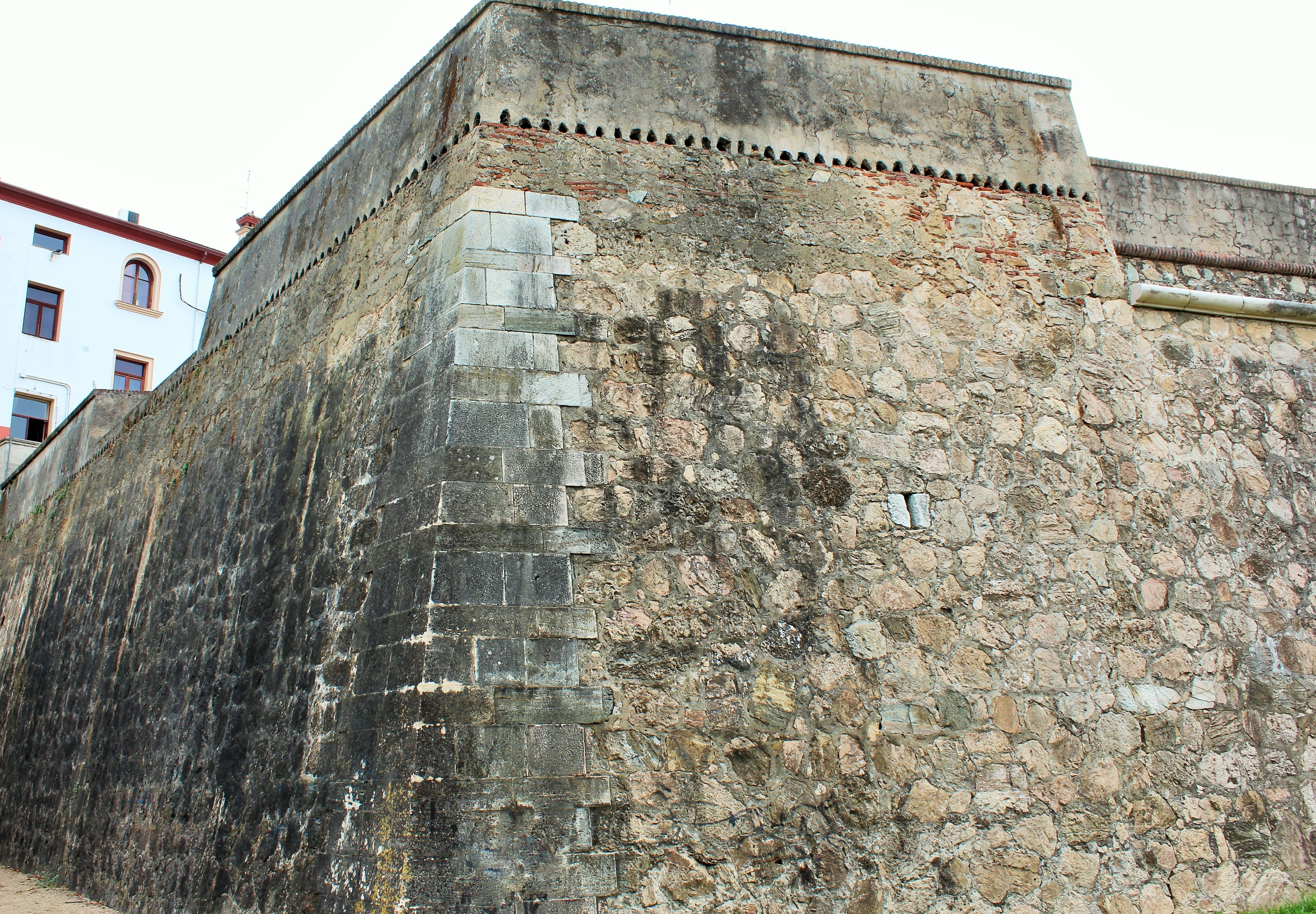 Unión de lienzos al oeste y norte.